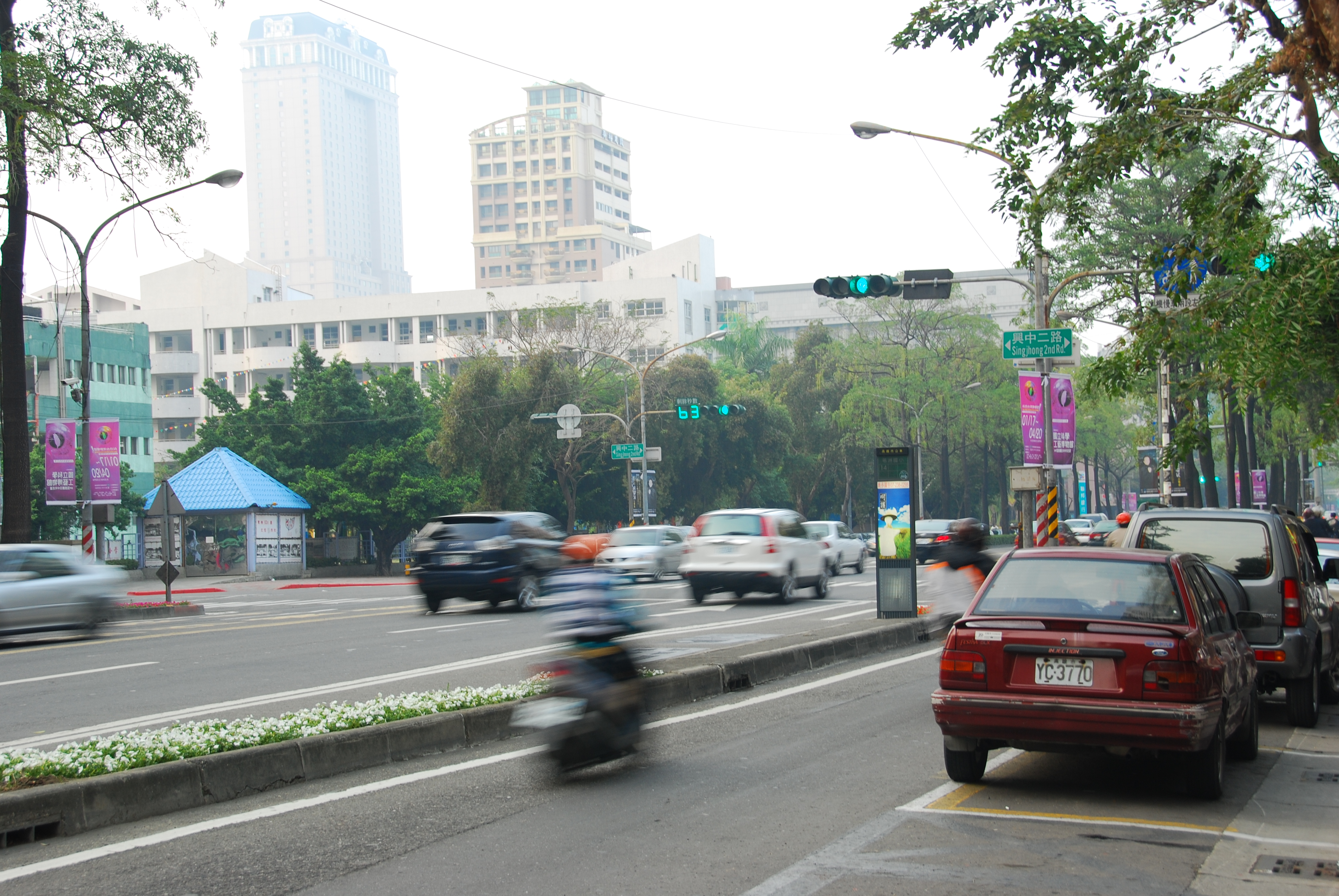 高雄市中華路及興中二路路口